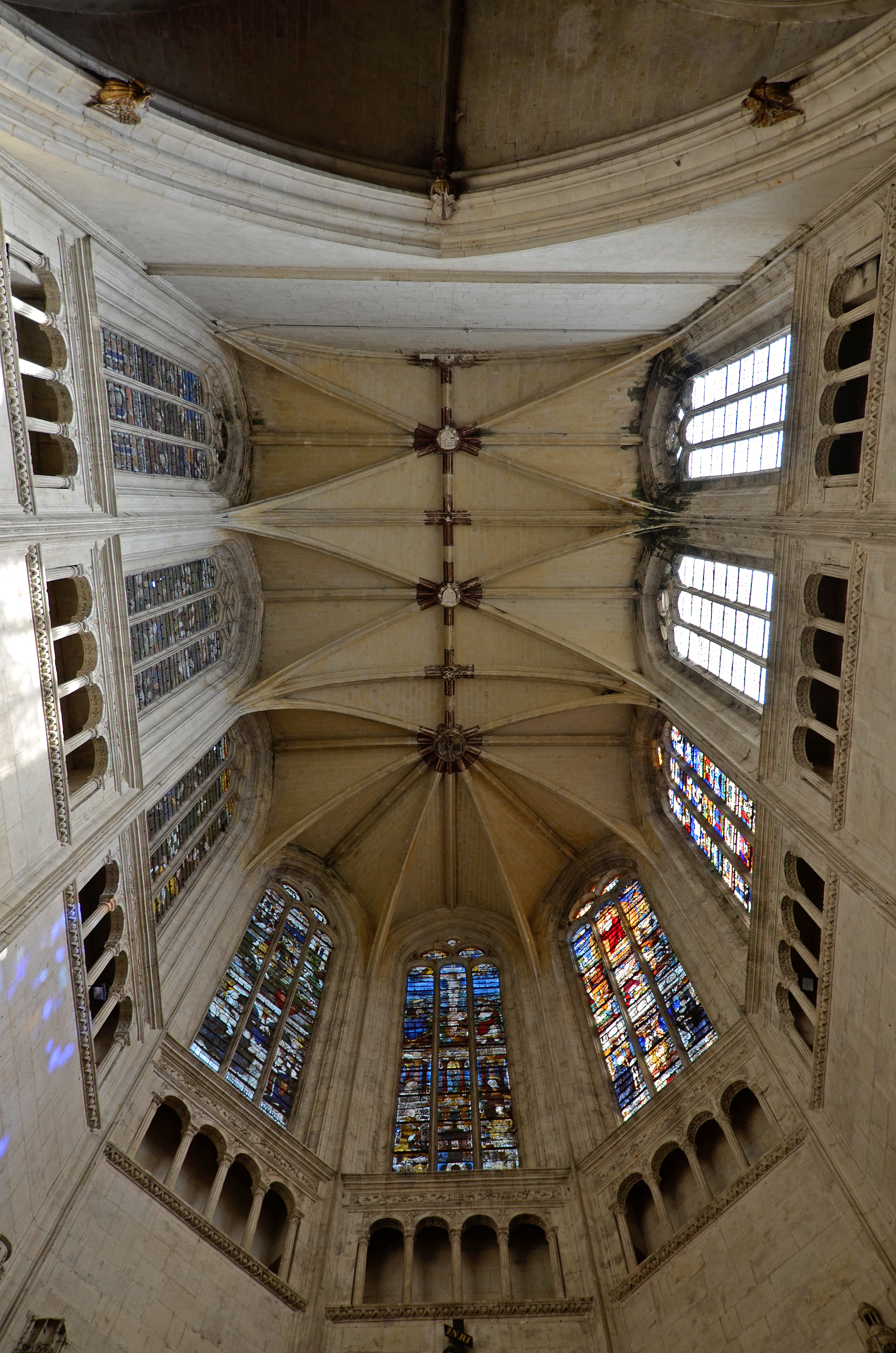 Église Notre-Dame-des-Marais de La Ferté-Bernard - Sarthe .